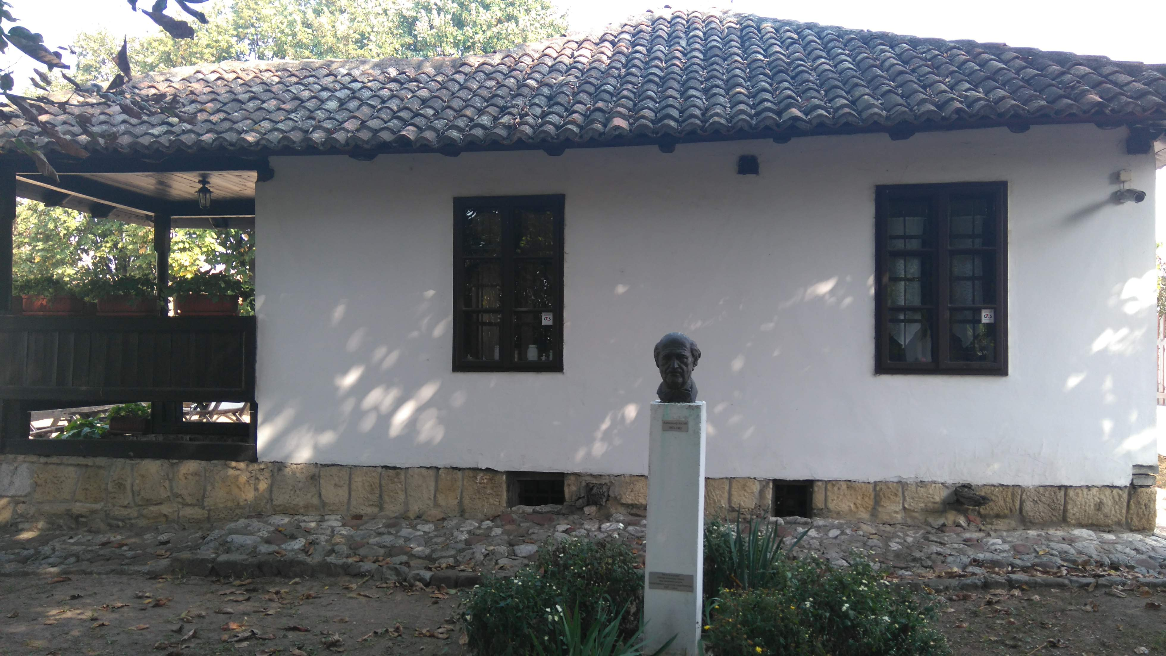 Rančićeva kuća (Grocka)